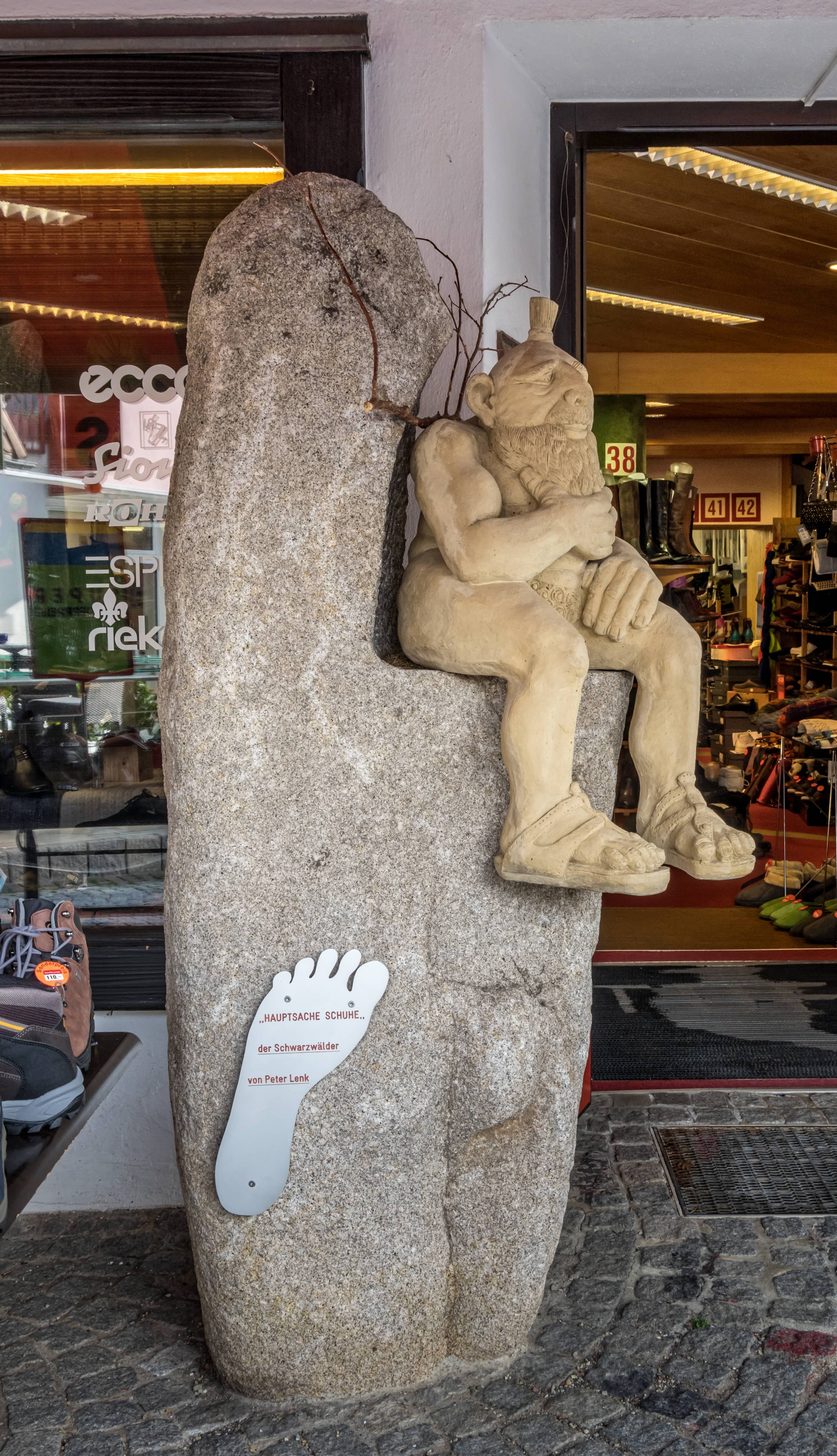 Bilder aus dem Ortsteil Neustadt der Stadt Titisee-Neustadt Der Schwarzwälder von Peter Lenk